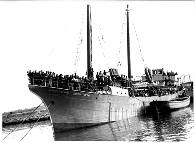 אוניית המעפילים אליהו גולומב